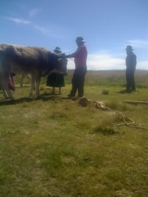 Tiempo de cosecha Ayni, Mink´a